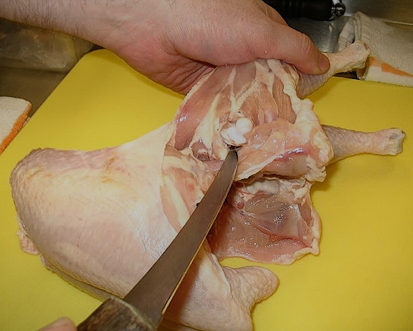 Ausbeinen (Entbeinen] von Hühnerschenkeln mit einem Ausbeinmesser.